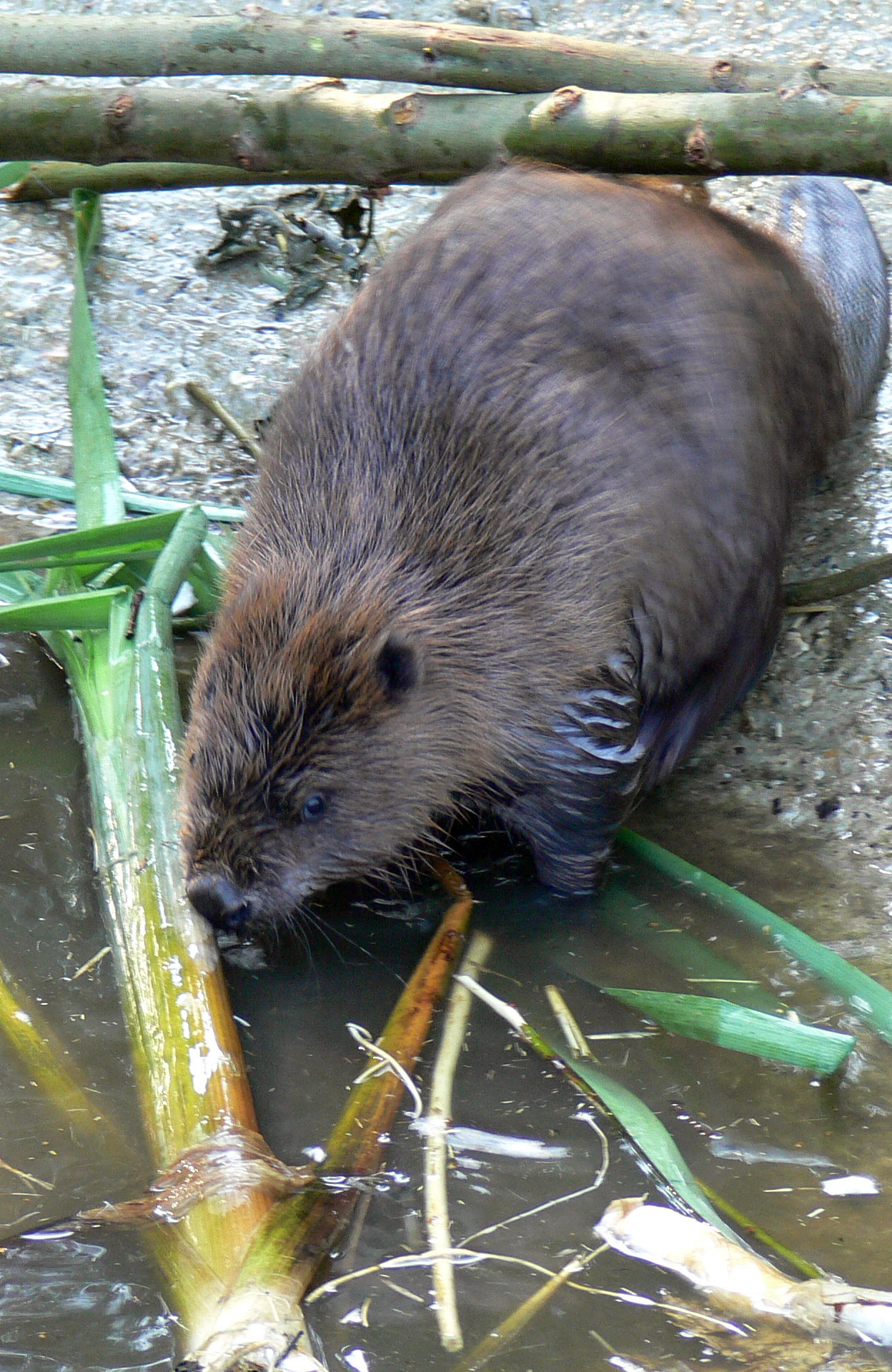 castor européen Parc de découverte de Wildwood